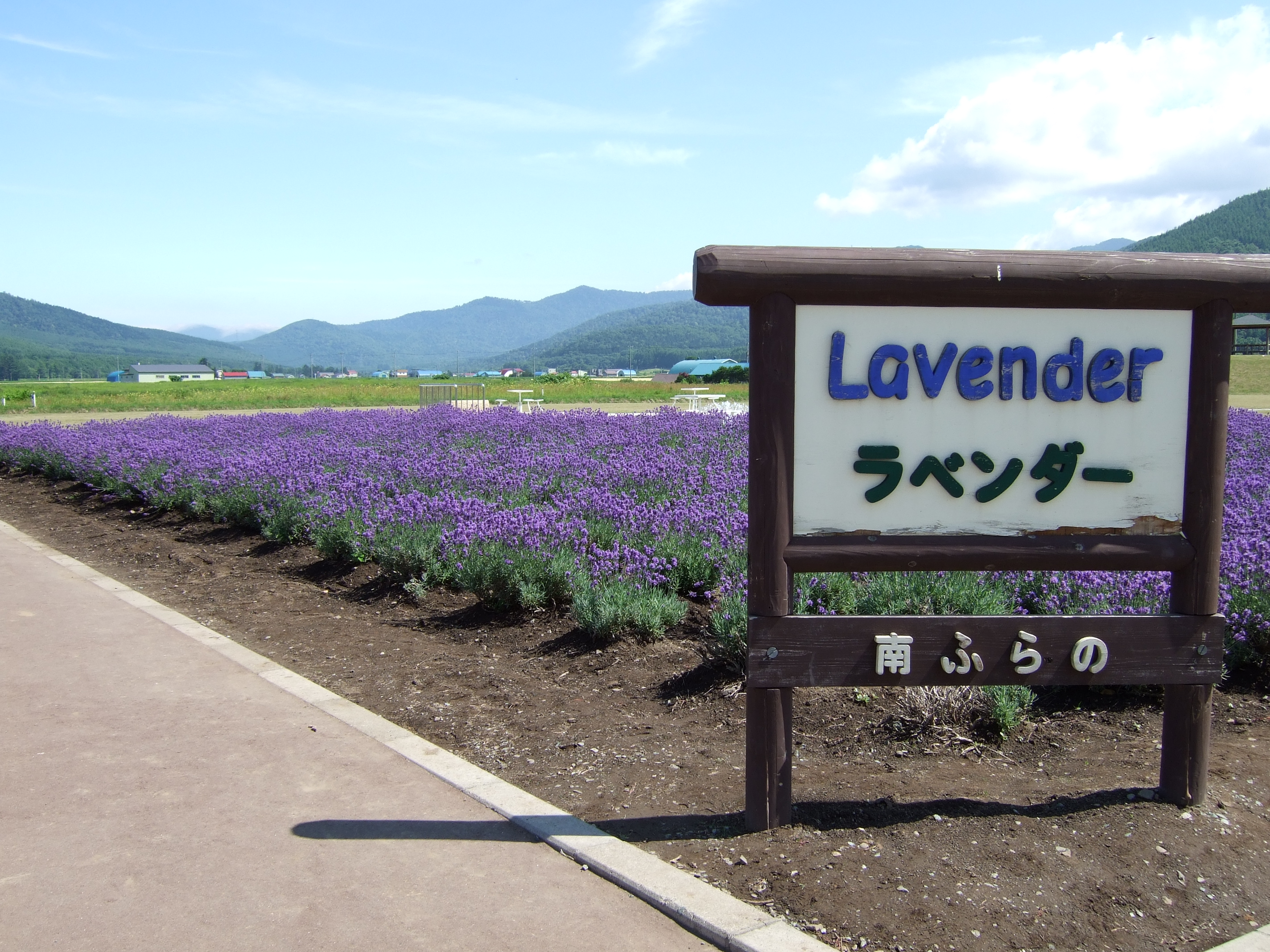 Michinoeki Minamifurano Lavender farm